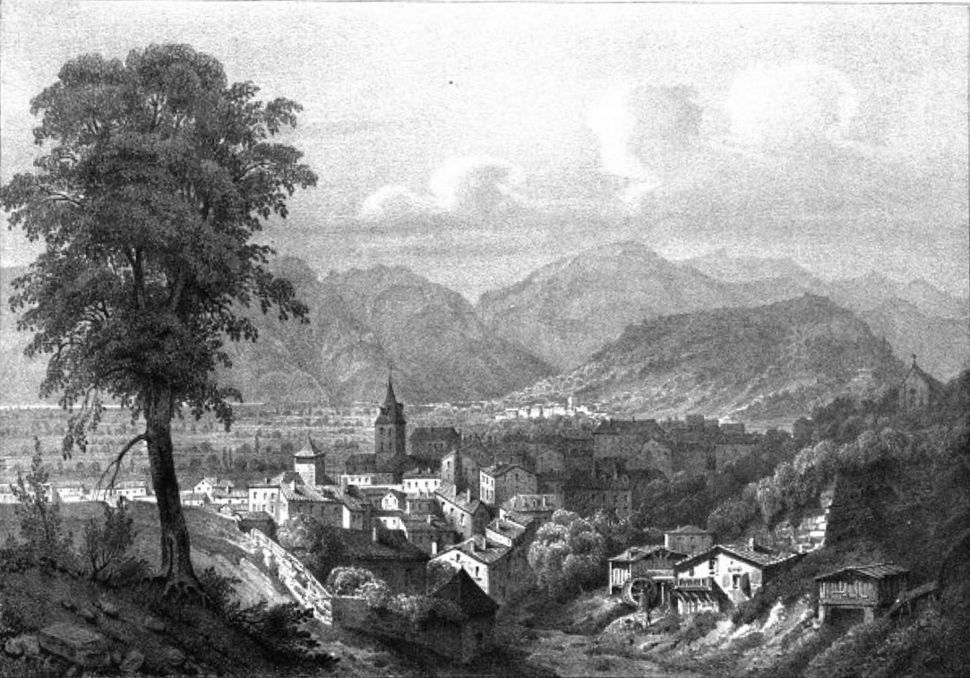 Album du Dauphiné - tome IV, litographie de Tullins, Isère